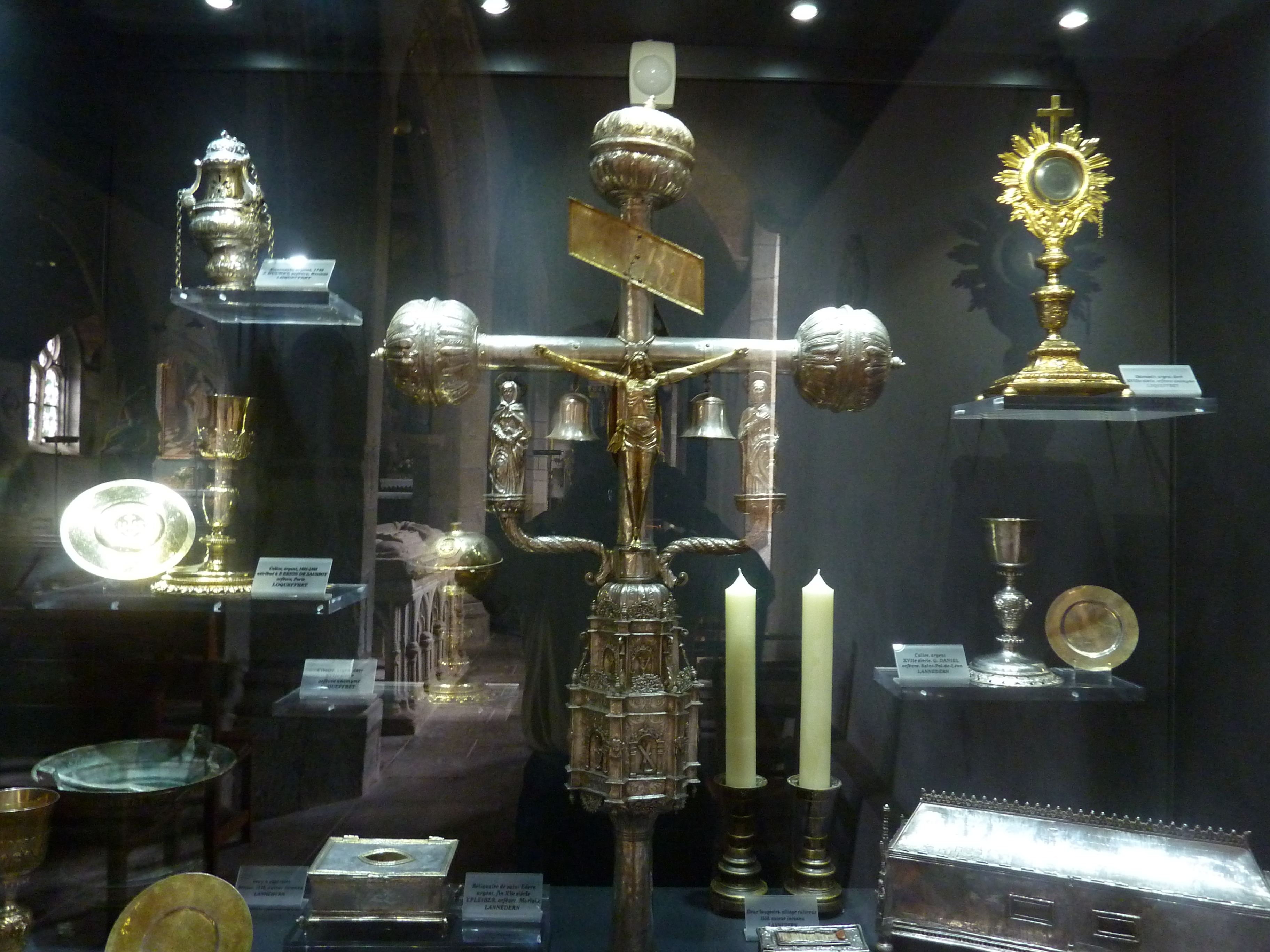 Lannédern: église Saint-Edern, pièces d'orfèvrerie